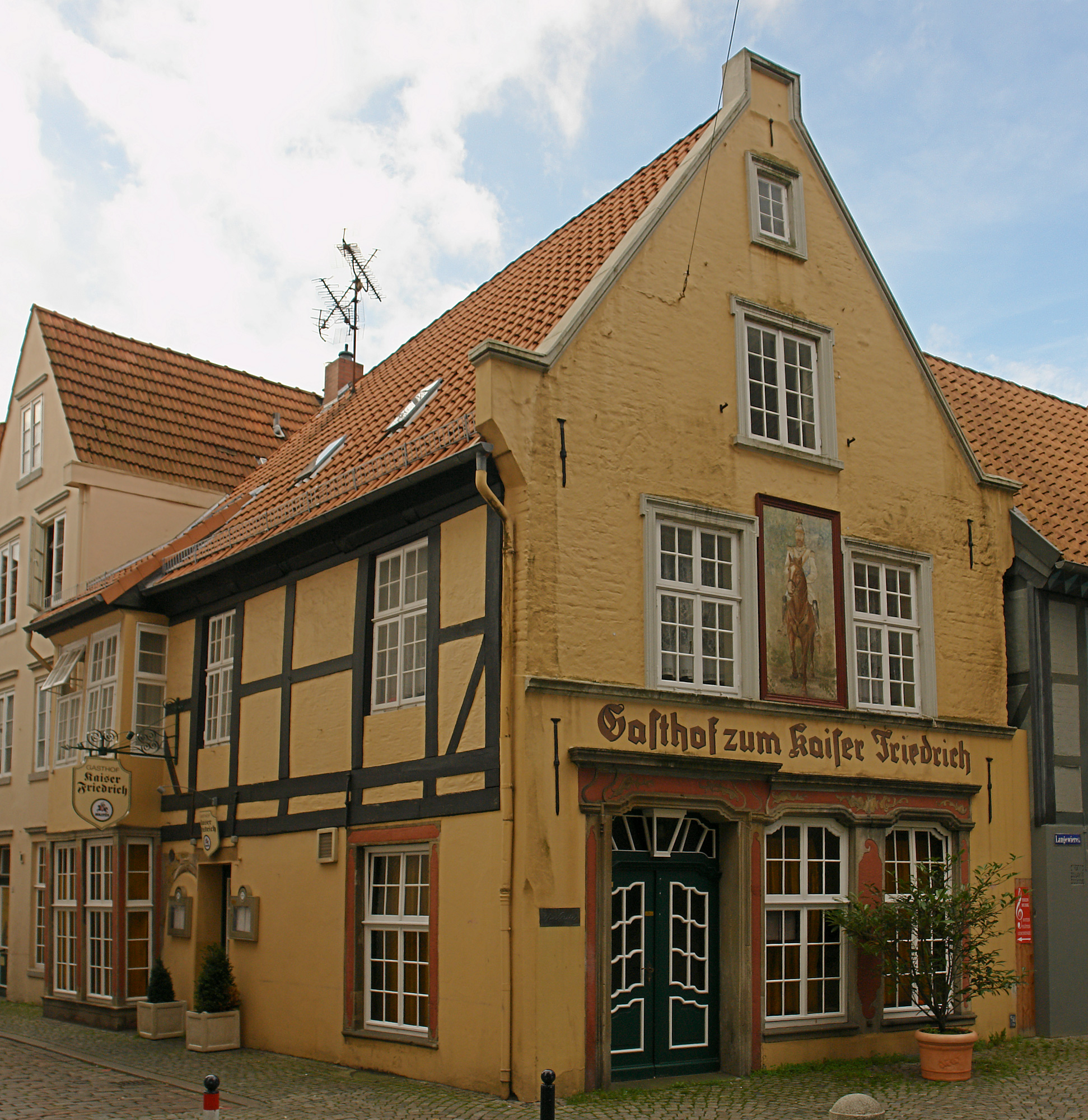 Gasthof zum Kaiser Friedrich in Bremen, Lange Wieren 13 / Am Landherrnamt 12.Das abgebildete Objekt ist ein geschütztes Kulturdenkmal in der Freien Hansestadt Bremen, mit der Nr. 0839 beim Landesamt für Denkmalpflege registriert.